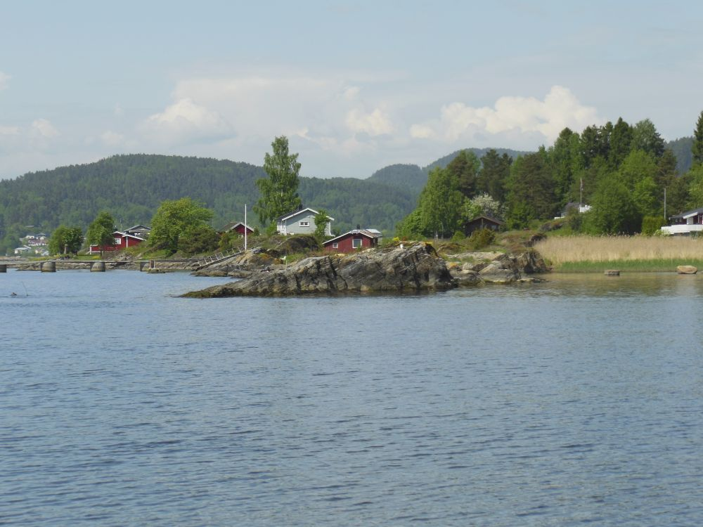 Kulpa ligger rett vest for Killingholmen.